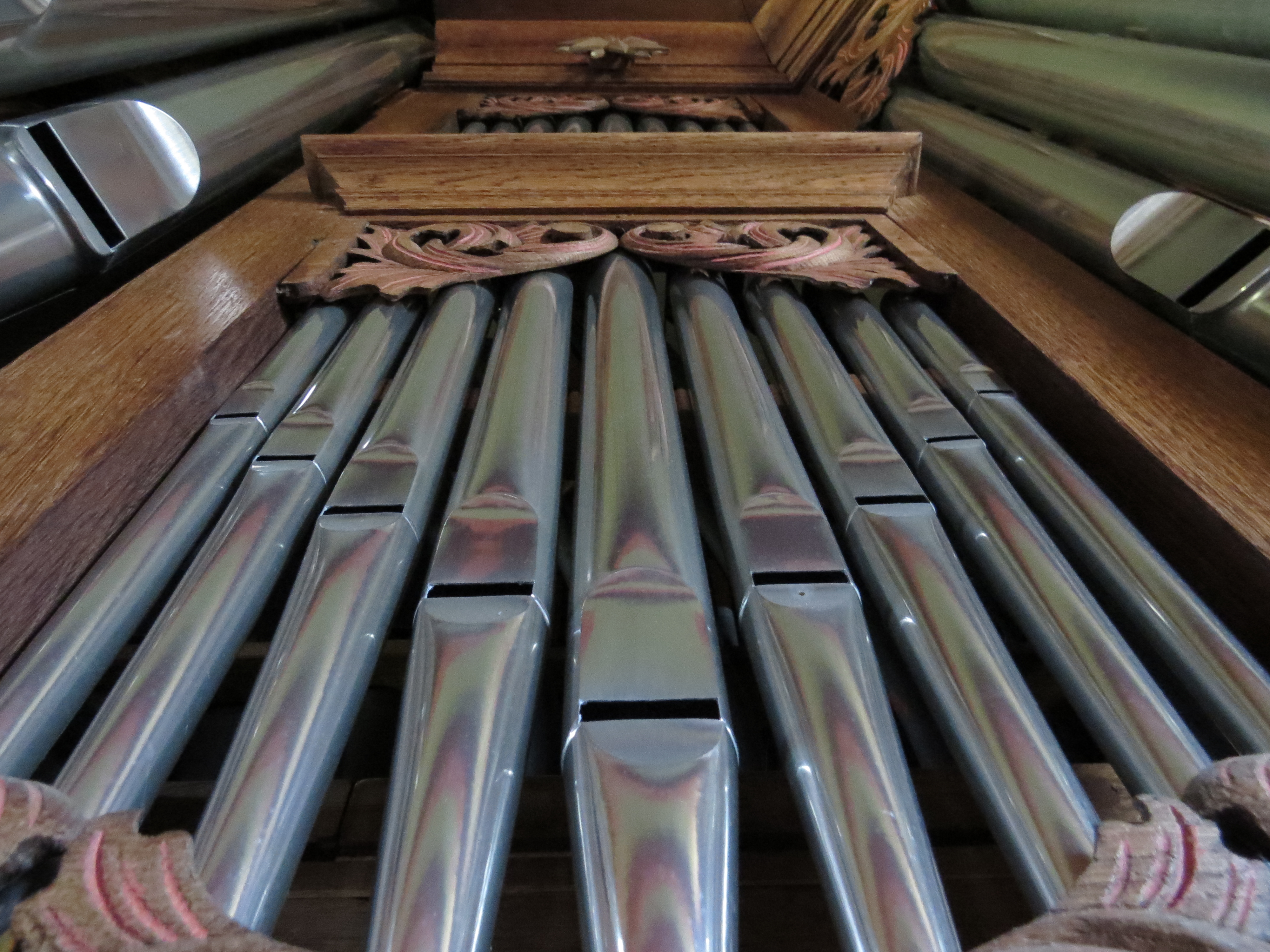 Prospektpfeifen der Orgel in der Alten Kirche Pellworm, Schleswig-Holstein